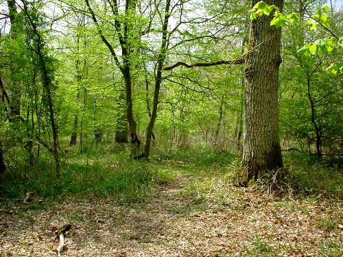 Dans la chênaie-charmaie, les espèces végétales majoritairement associées sont les chênes et les charmes. La chênaie-charmaie, est une forêt âgée de plusieurs centaines d’années.